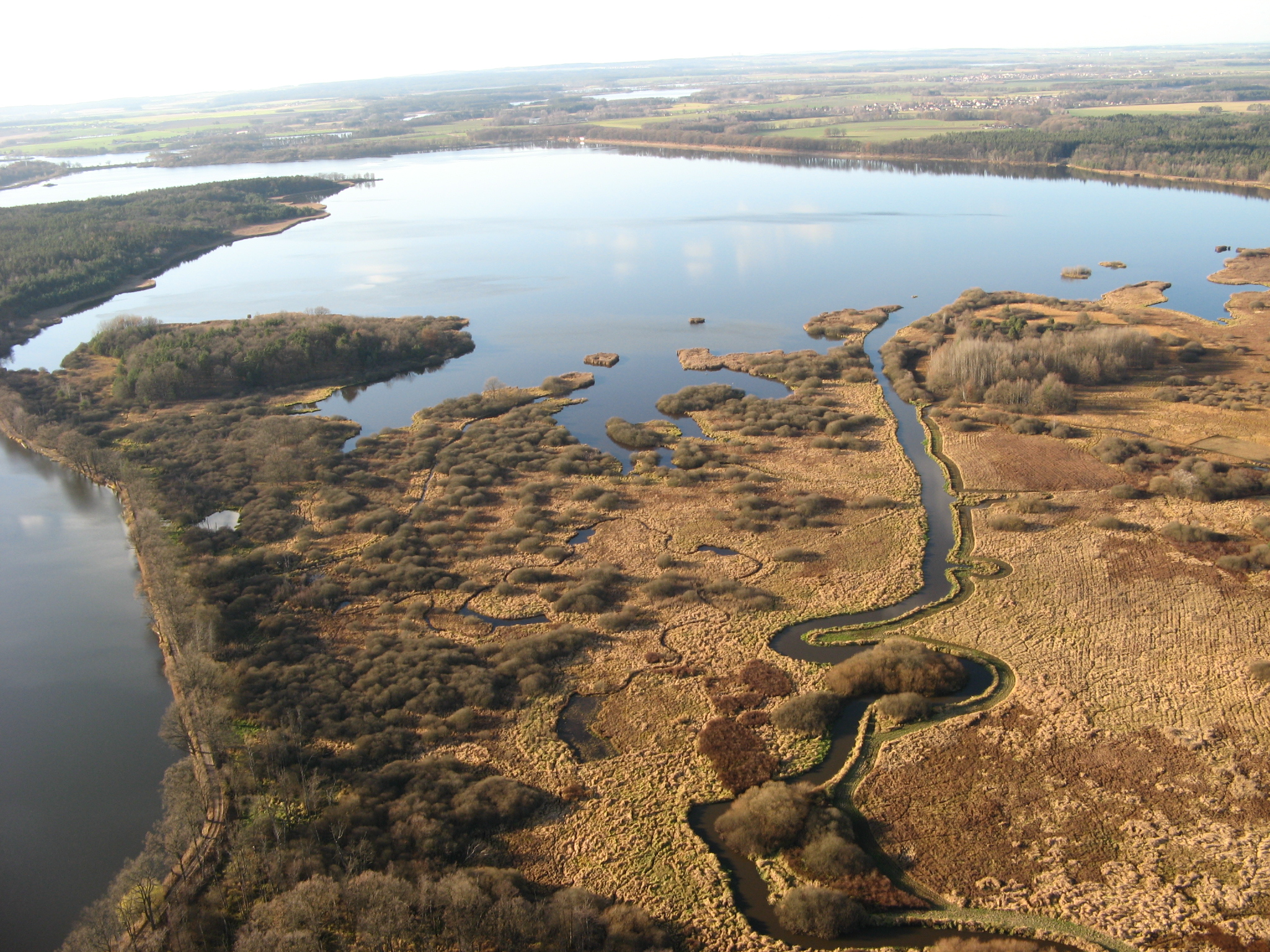 Rybník - Rožmberská rybniční soustava (Třeboň), Třeboň